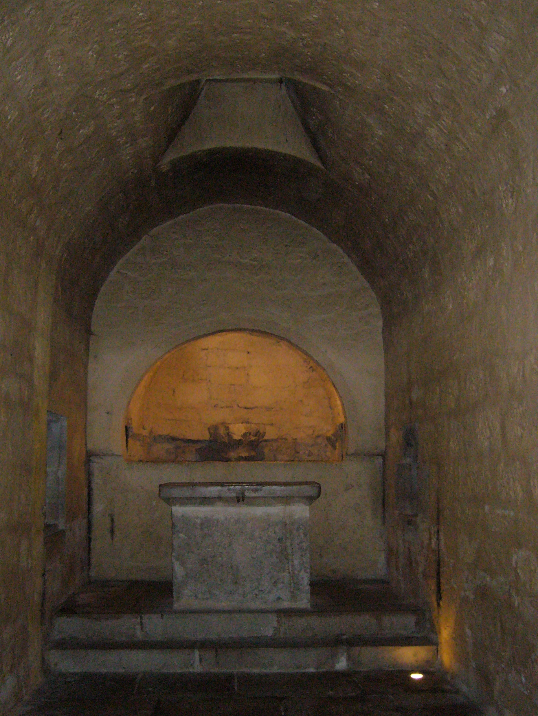 Tombeau de Saint Privat, Mende (Lozère, France)